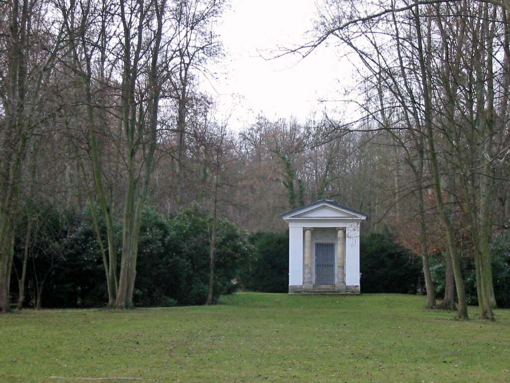 Le temple de David à Épône Photo JH Mora, janvier 2005